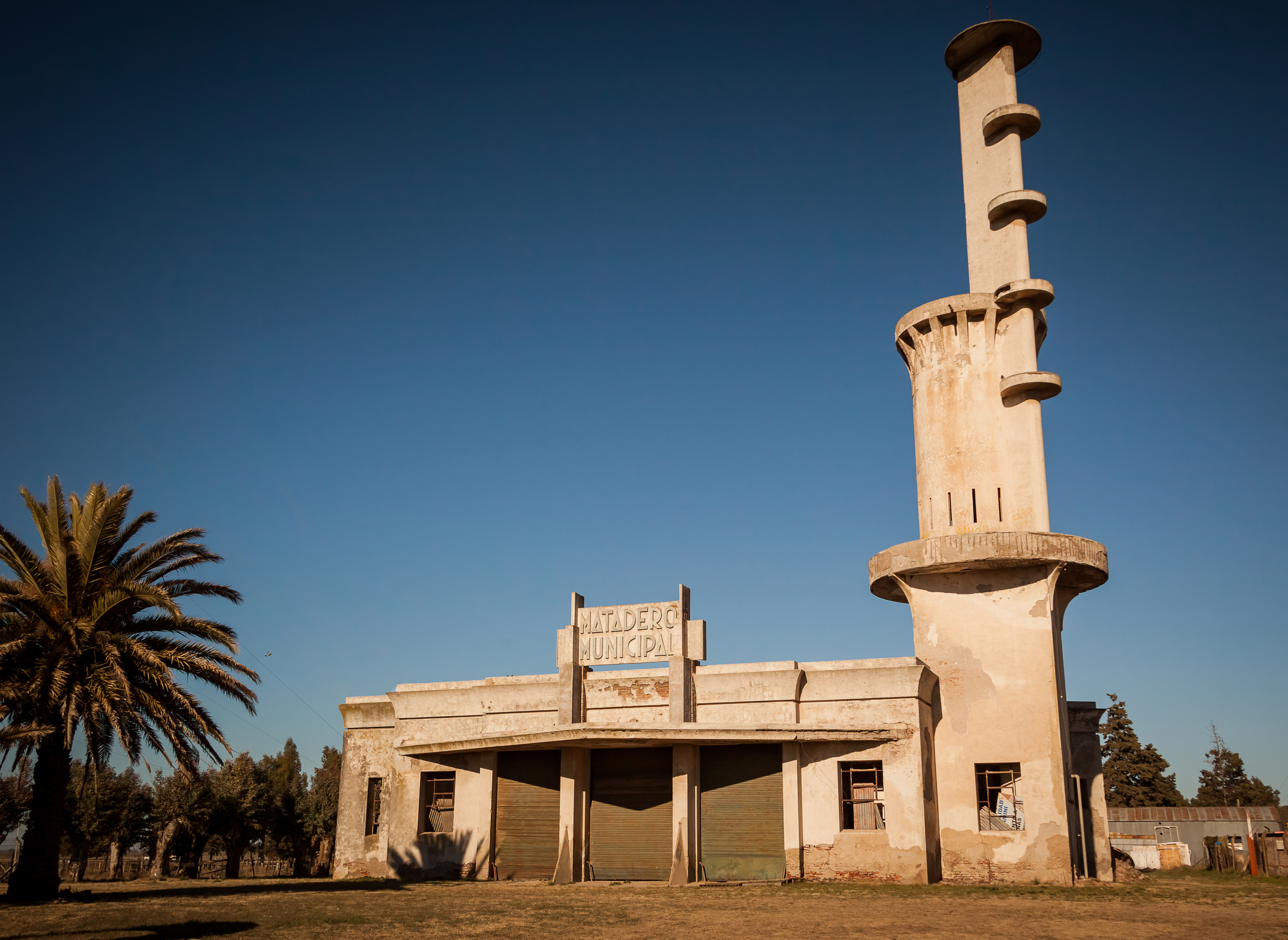 Matadero Municipal de Guaminí